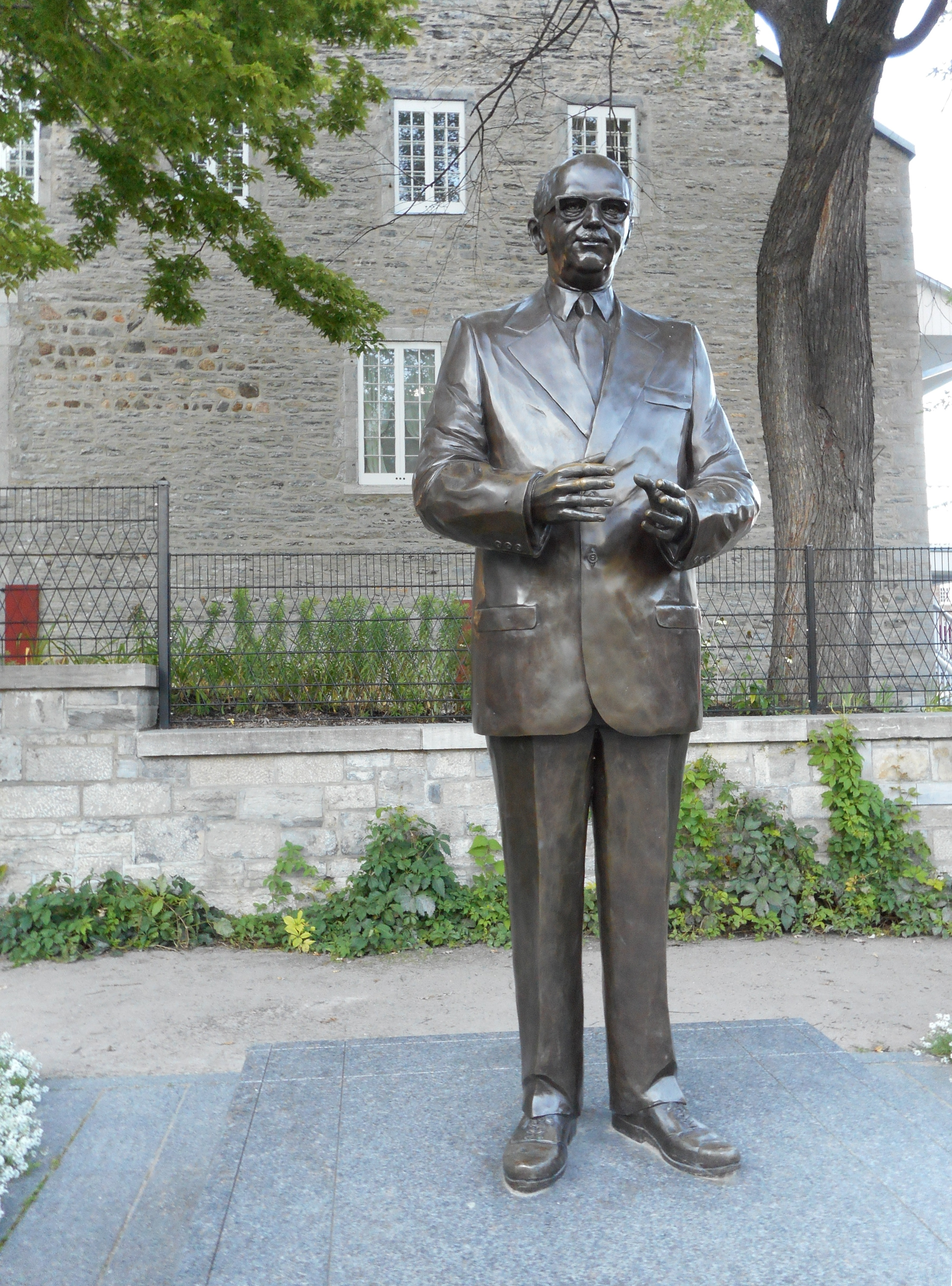 Bronze représentant Jean Drapeau, ancien maire de Montréal, par Annick Bourgeau, situé à la place De La Dauversière à Montréal depuis 2001. Derrière, on aperçoit le Château Ramezay.